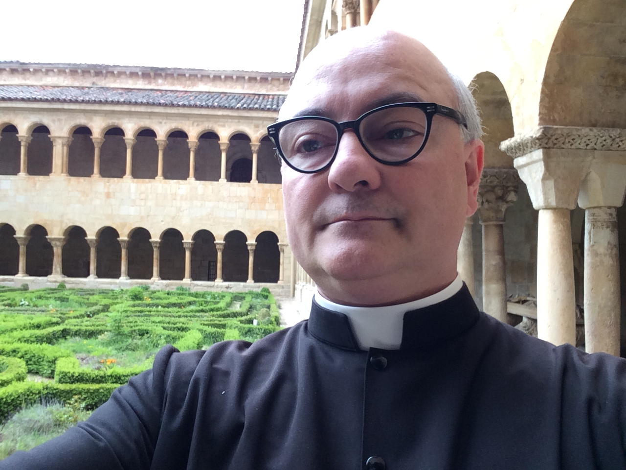 José Antonio Fortea Cucurull, de visita en ese monasterio benedictino.